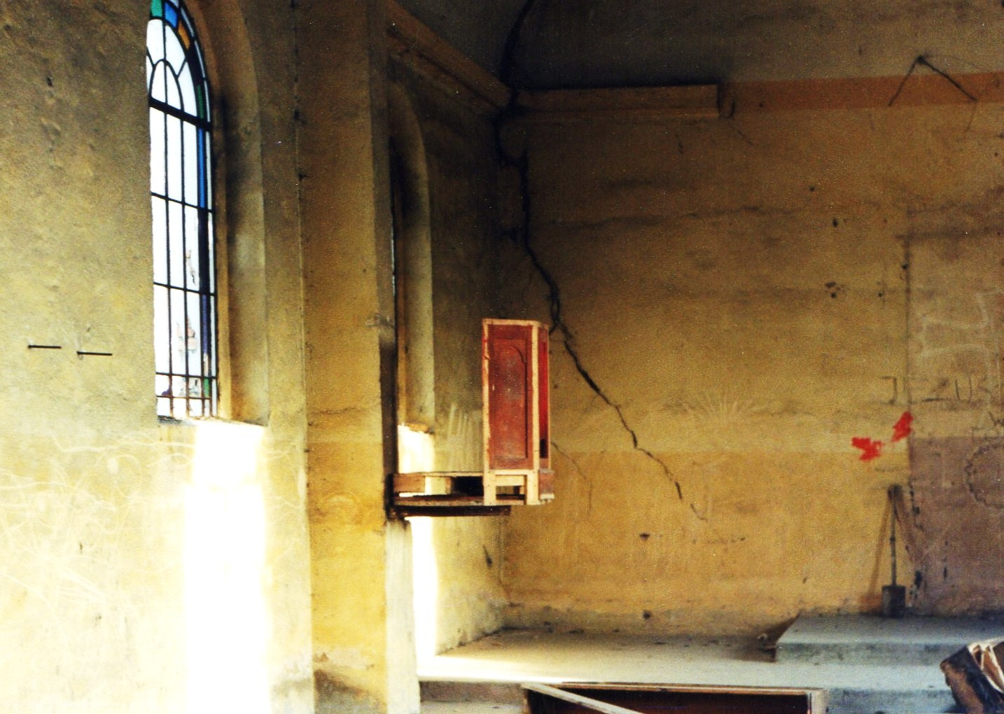 Kościół św. Trójcy na Morasku w Poznaniu - 1996r.